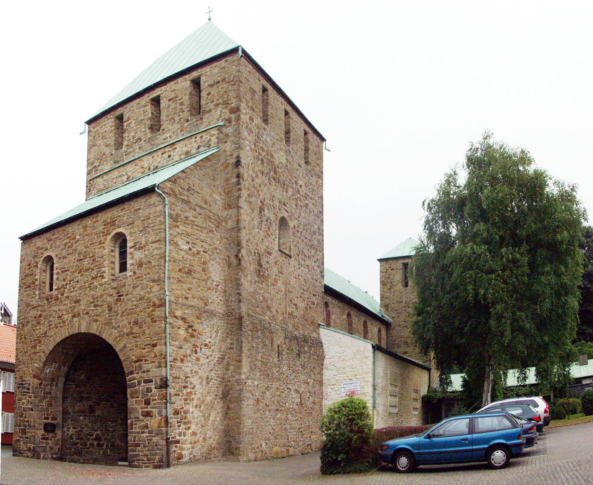 St.-Lucius-Kirche in Essen-Werden, Germany